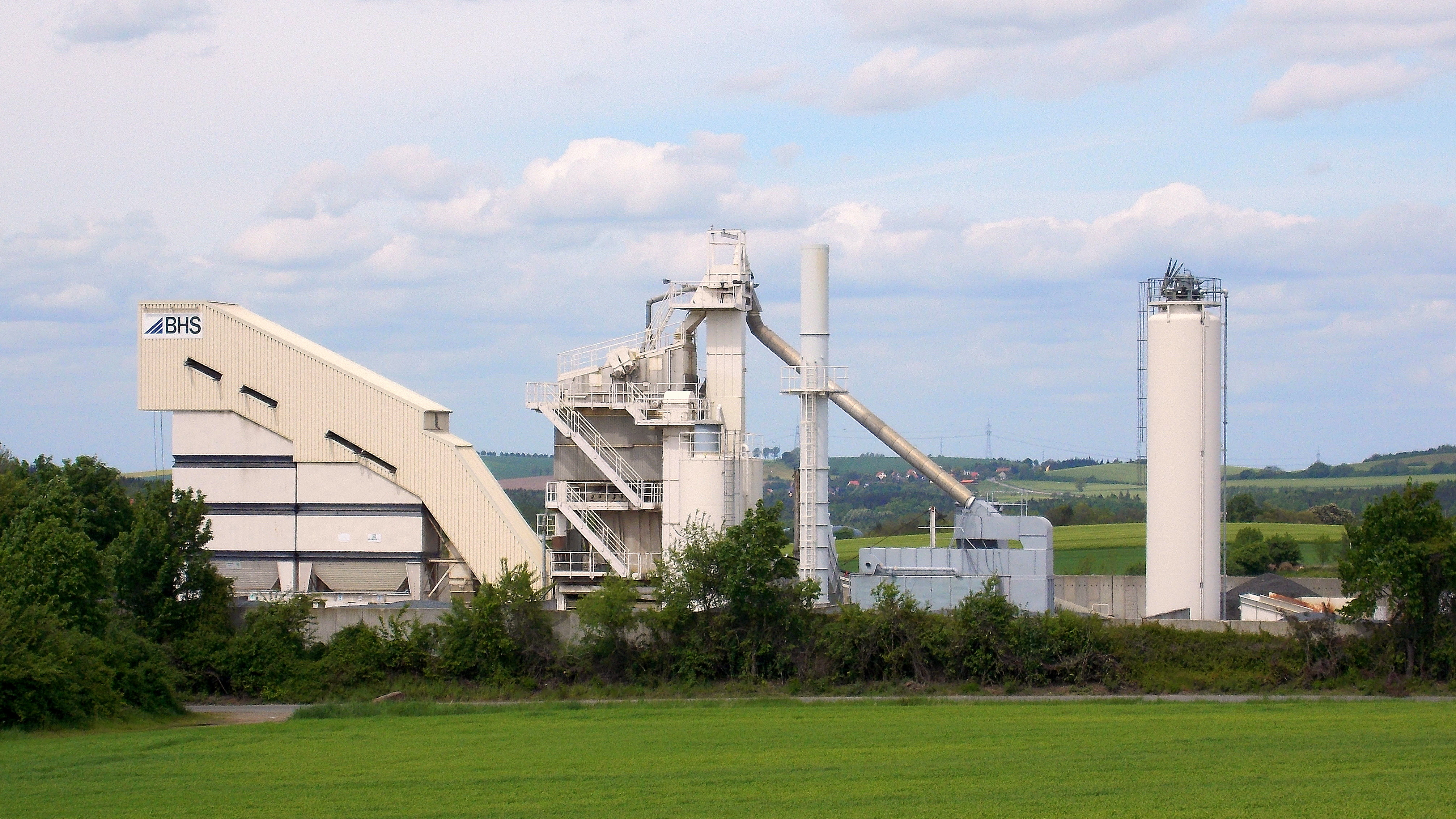 Das Asphaltmischwerk Reinholdshain bei Dippoldiswalde im Frühjahrsgrün der Natur 2014.